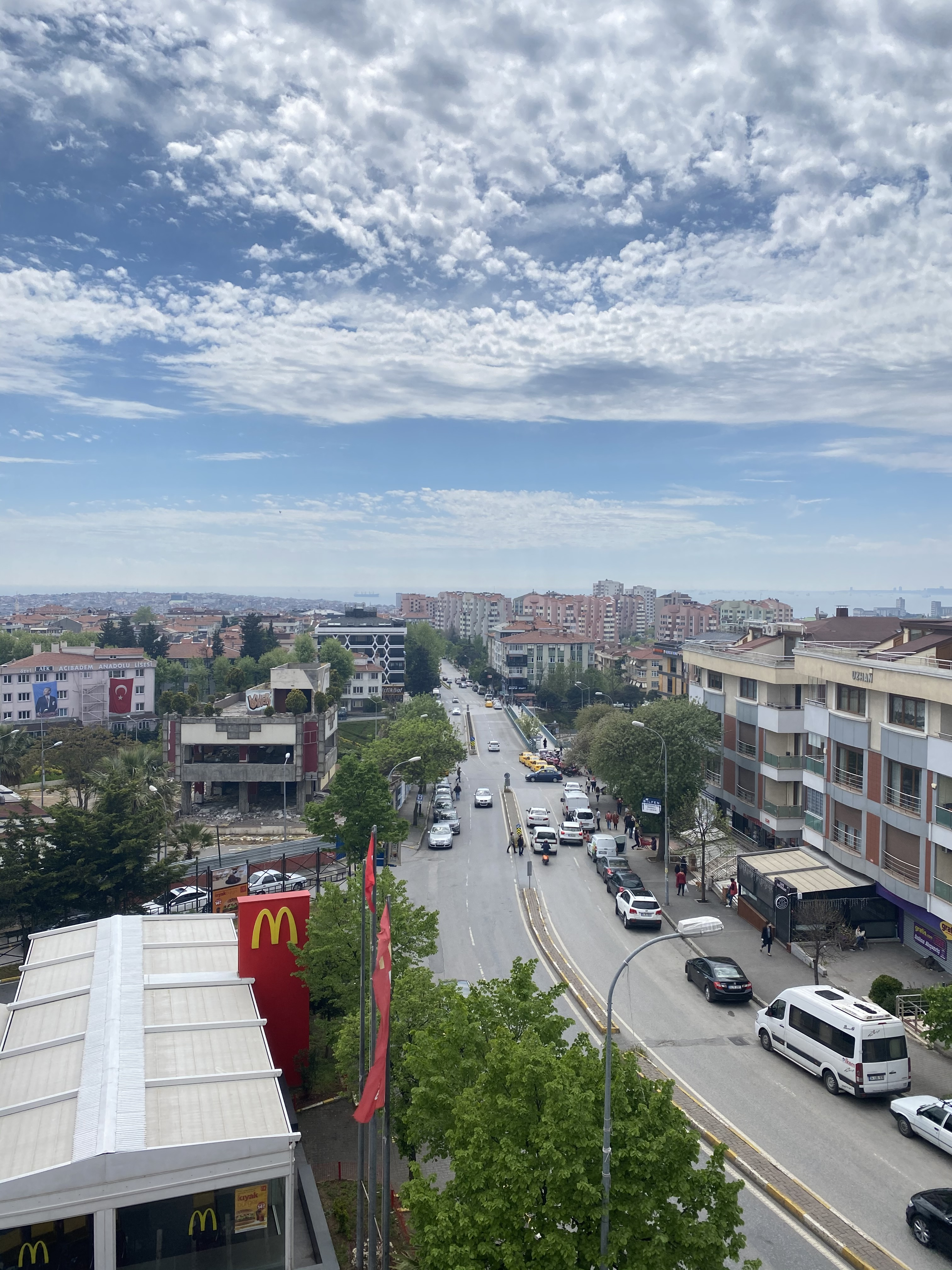 Acibadem Koprusu'nun ustten gorunumu.